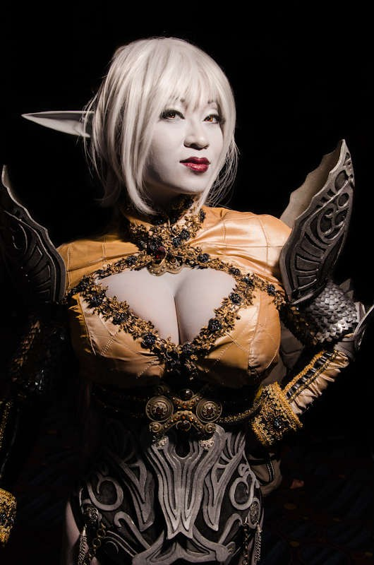 Yaya Han appearing at DragonCon 2012 in cosplay.